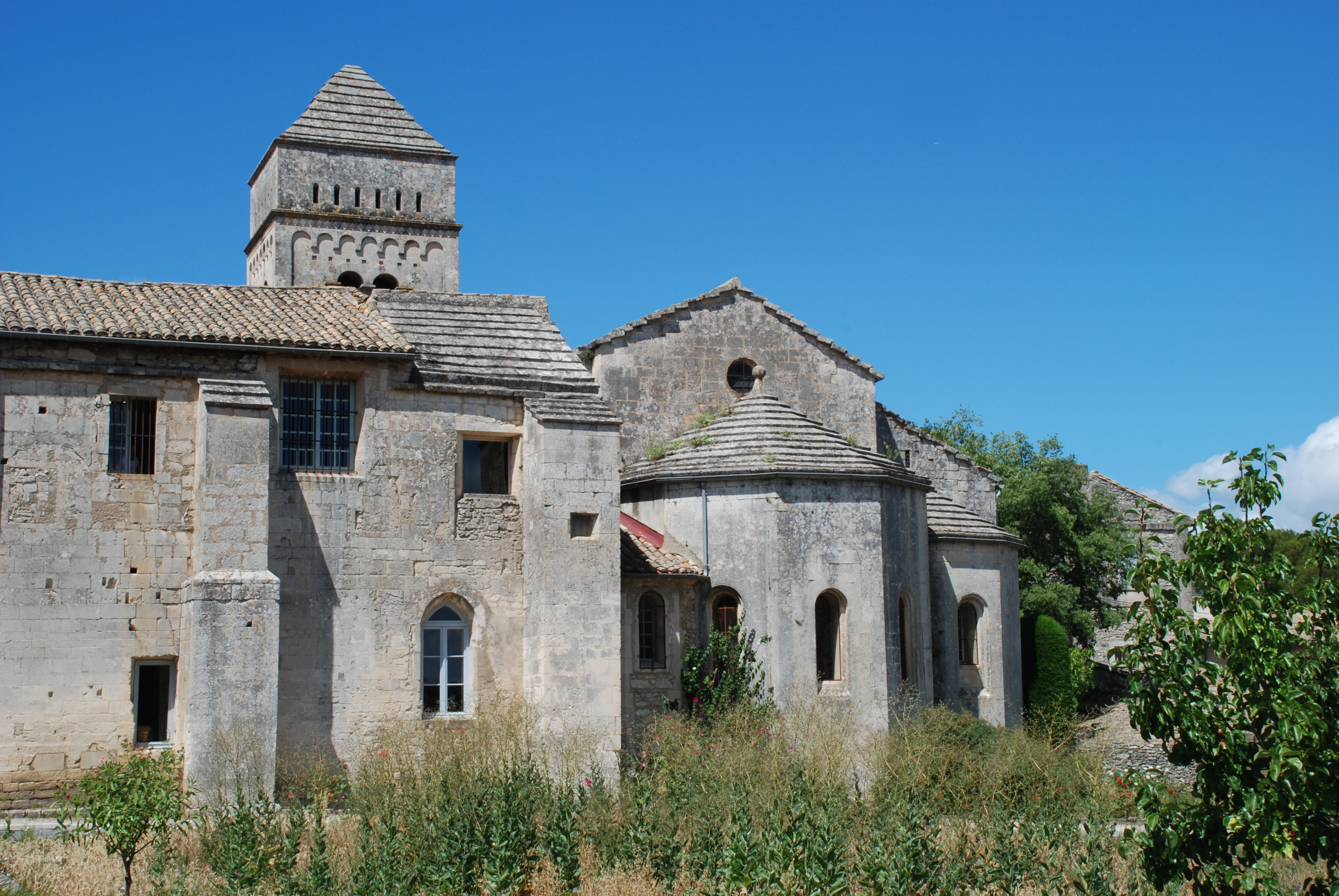 France - Provence - Bouches-du-Rhône - Monastère Saint-Paul-de-Mausole